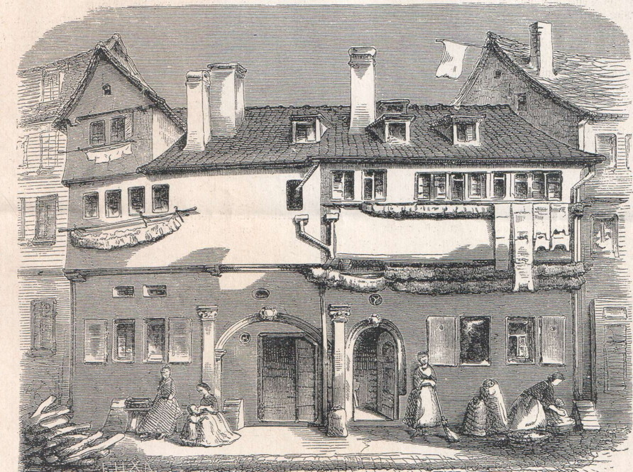 Fantasiedarstellung des ersten Wohnhauses von Joseph Süß Oppenheimer in der Judengasse in Stuttgart.